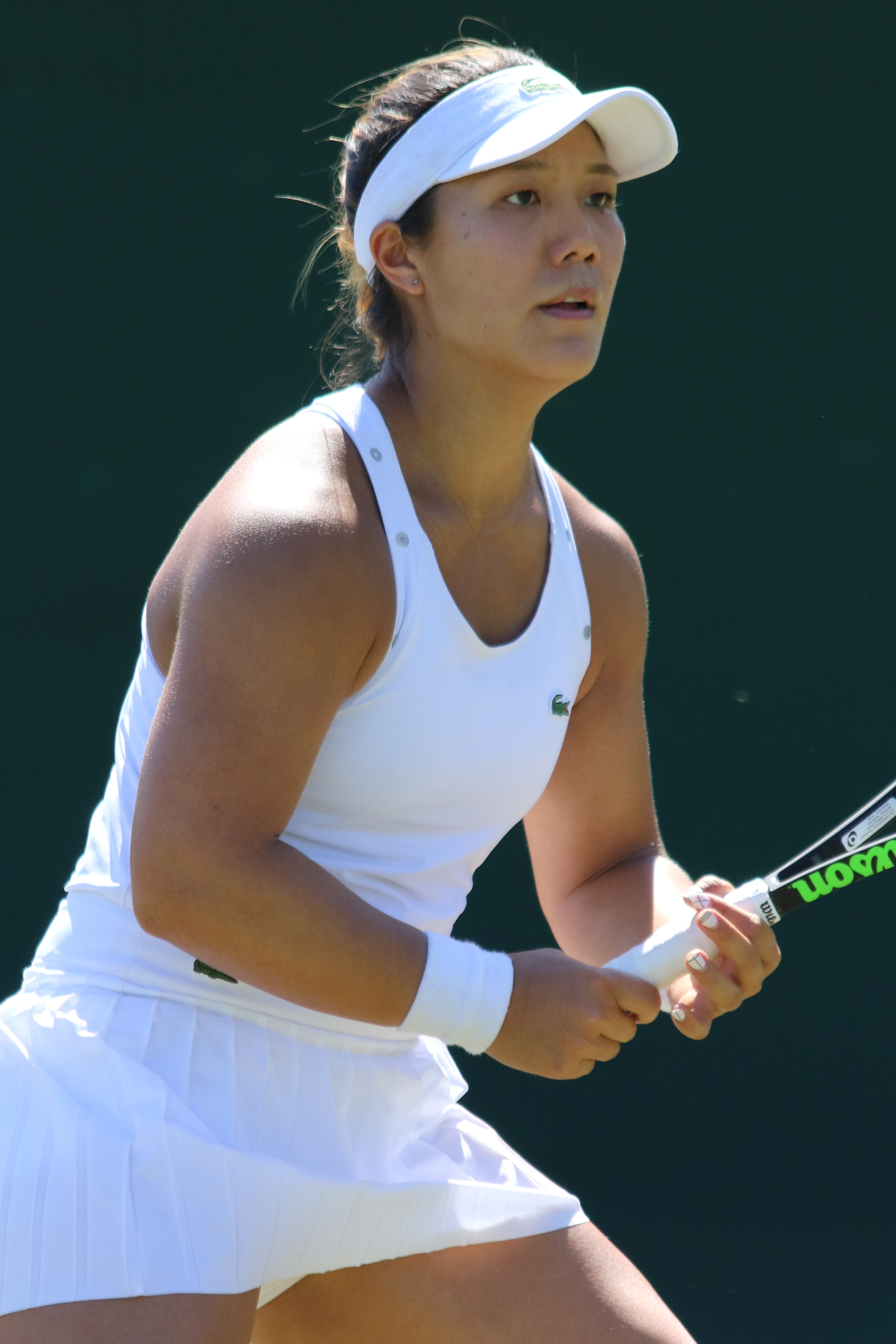 Ahn WMQ18 (52)